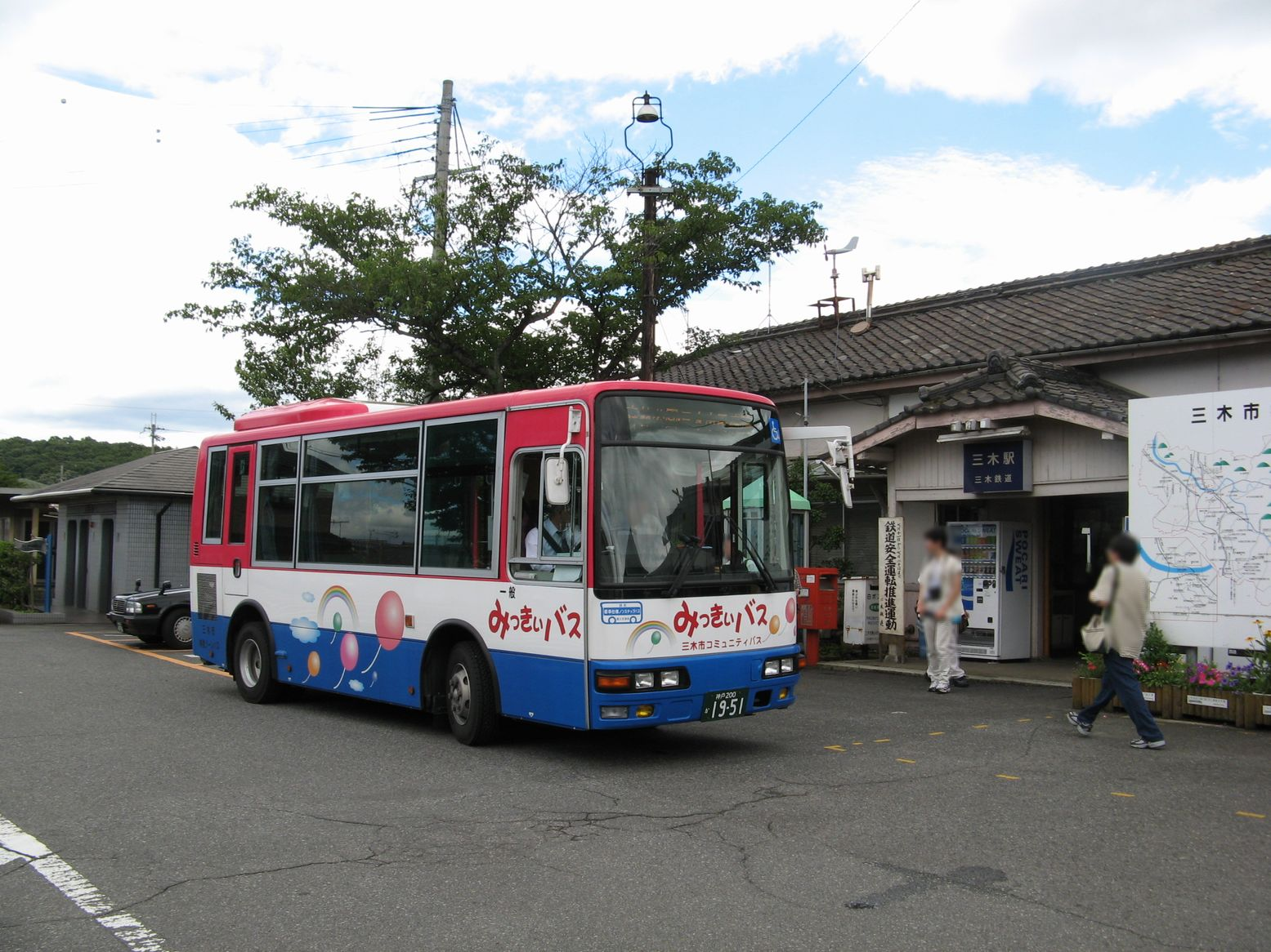 みっきぃバス 三木鉄道三木駅前（当時）にて